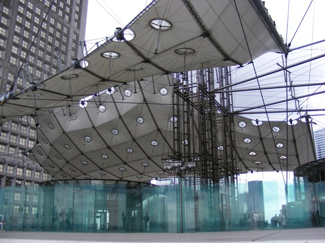 La Défense - Grande Arche